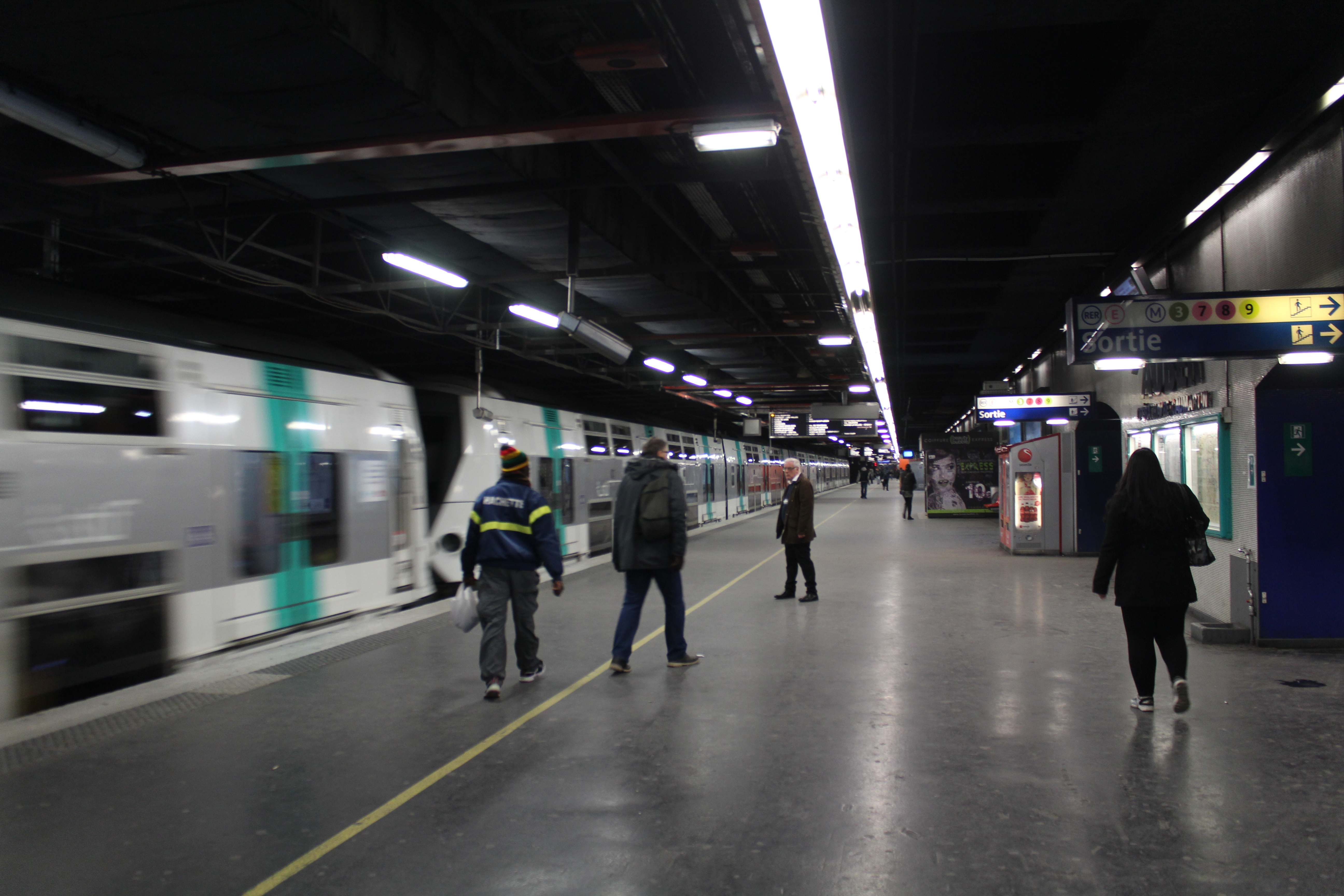 Gare d'Auber, Paris.